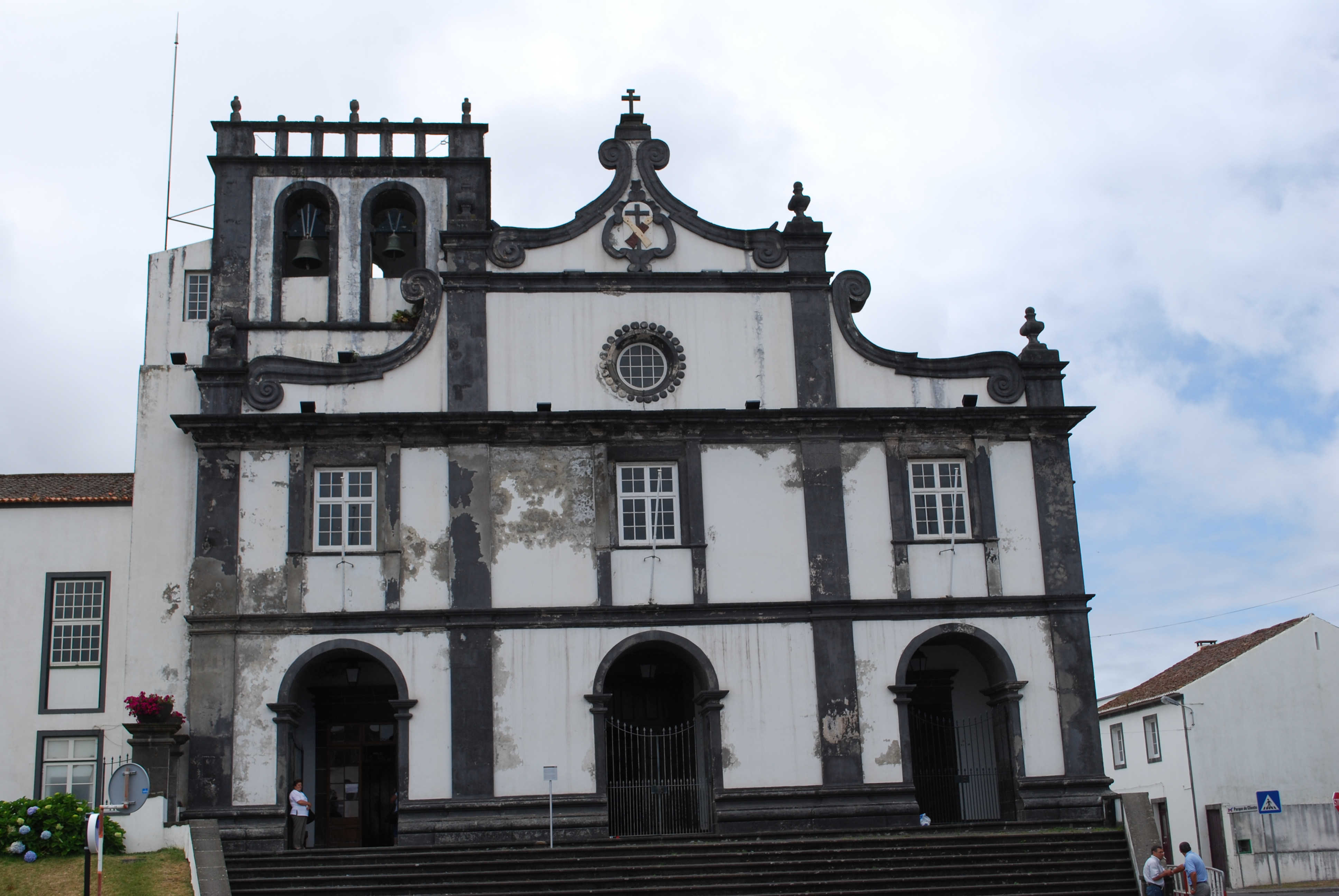 Fachada principal da Igreja do Convento de São Francisco da Ribeira Grande